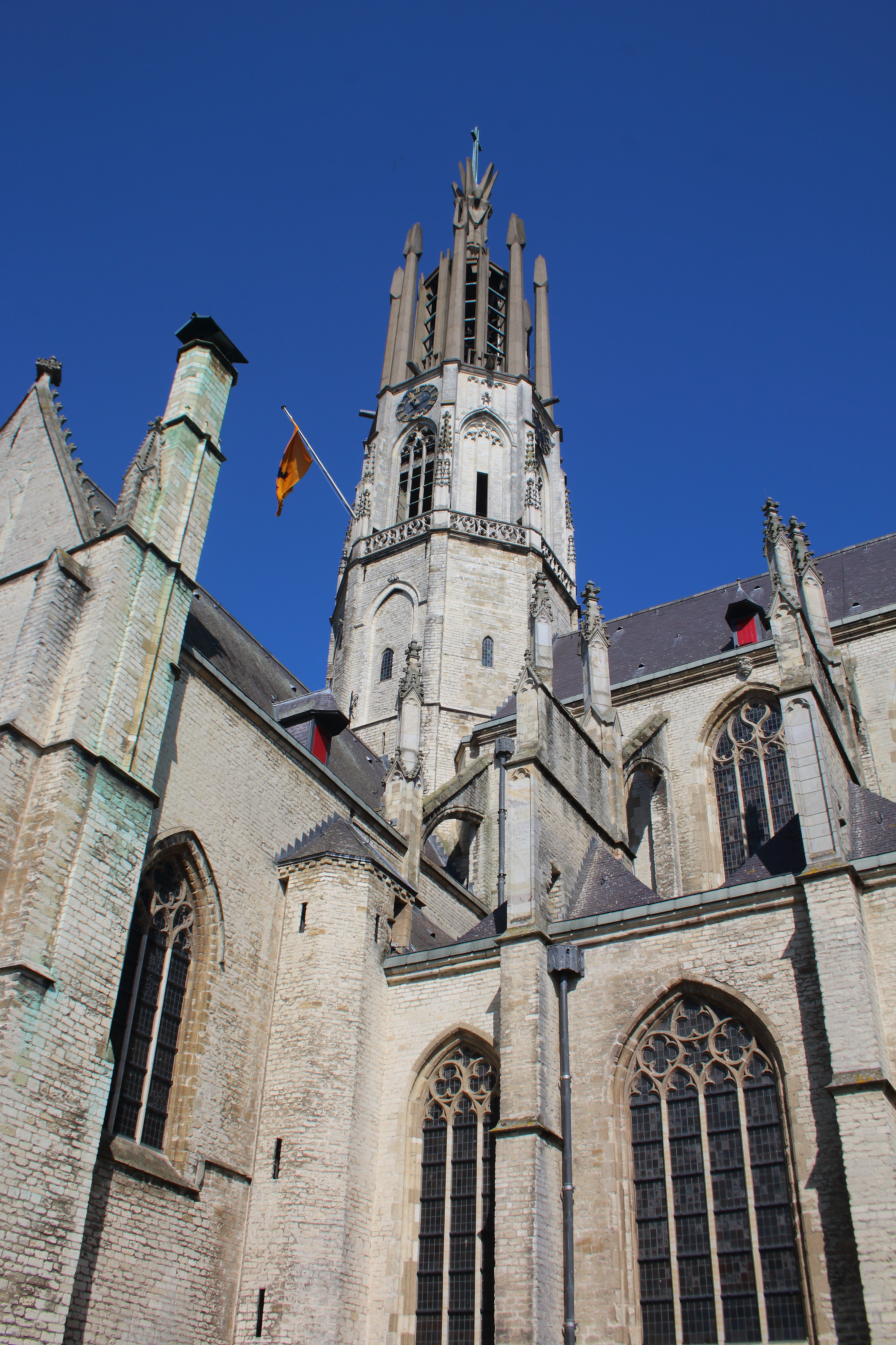 Sint-Willibrordusbasiliek, Hulst, Zeeuws-Vlaanderen, Zeeland, Nederland